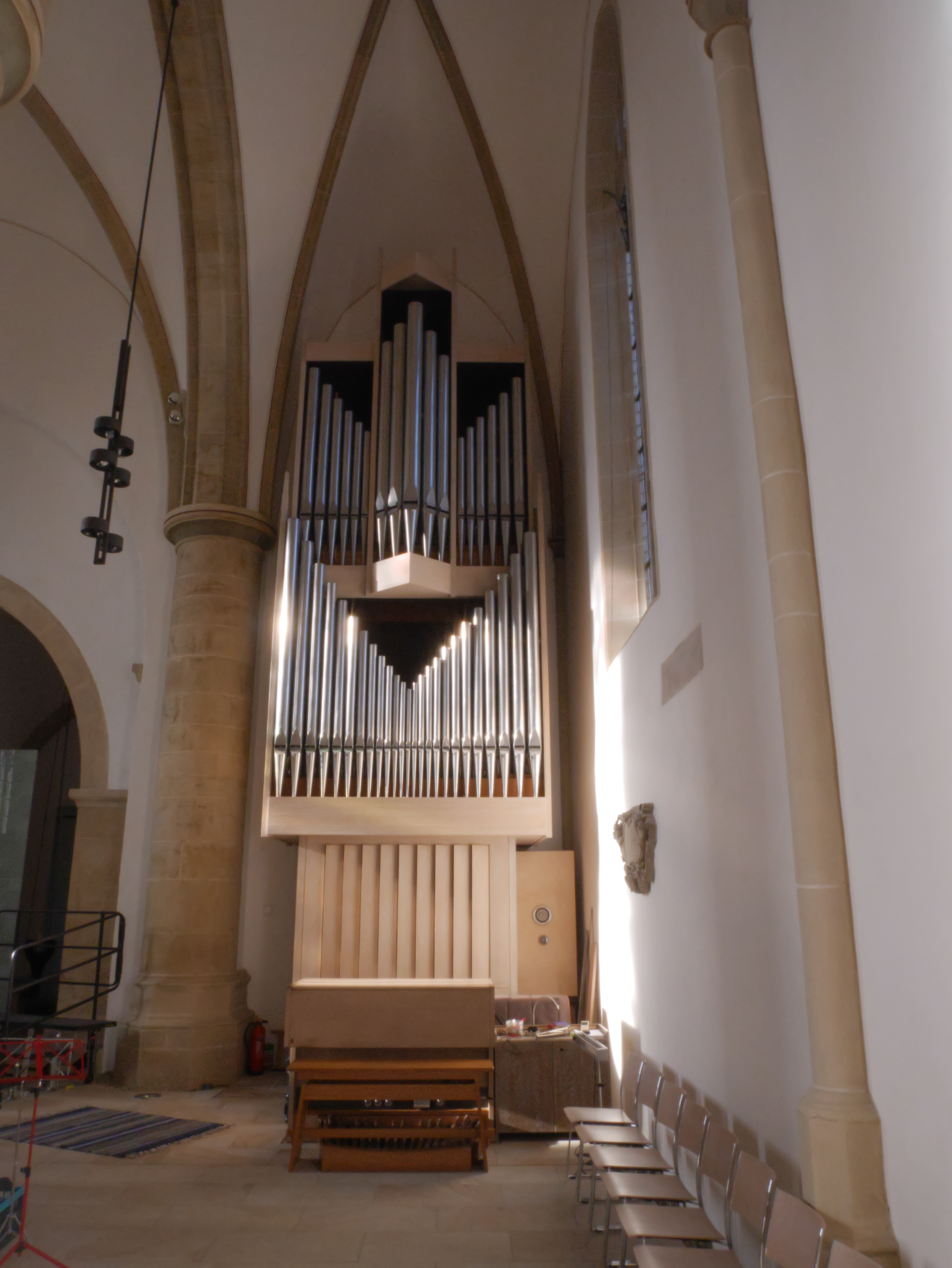 Orgel der Christuskirche in Ibbenbüren, NRW, Deutschland